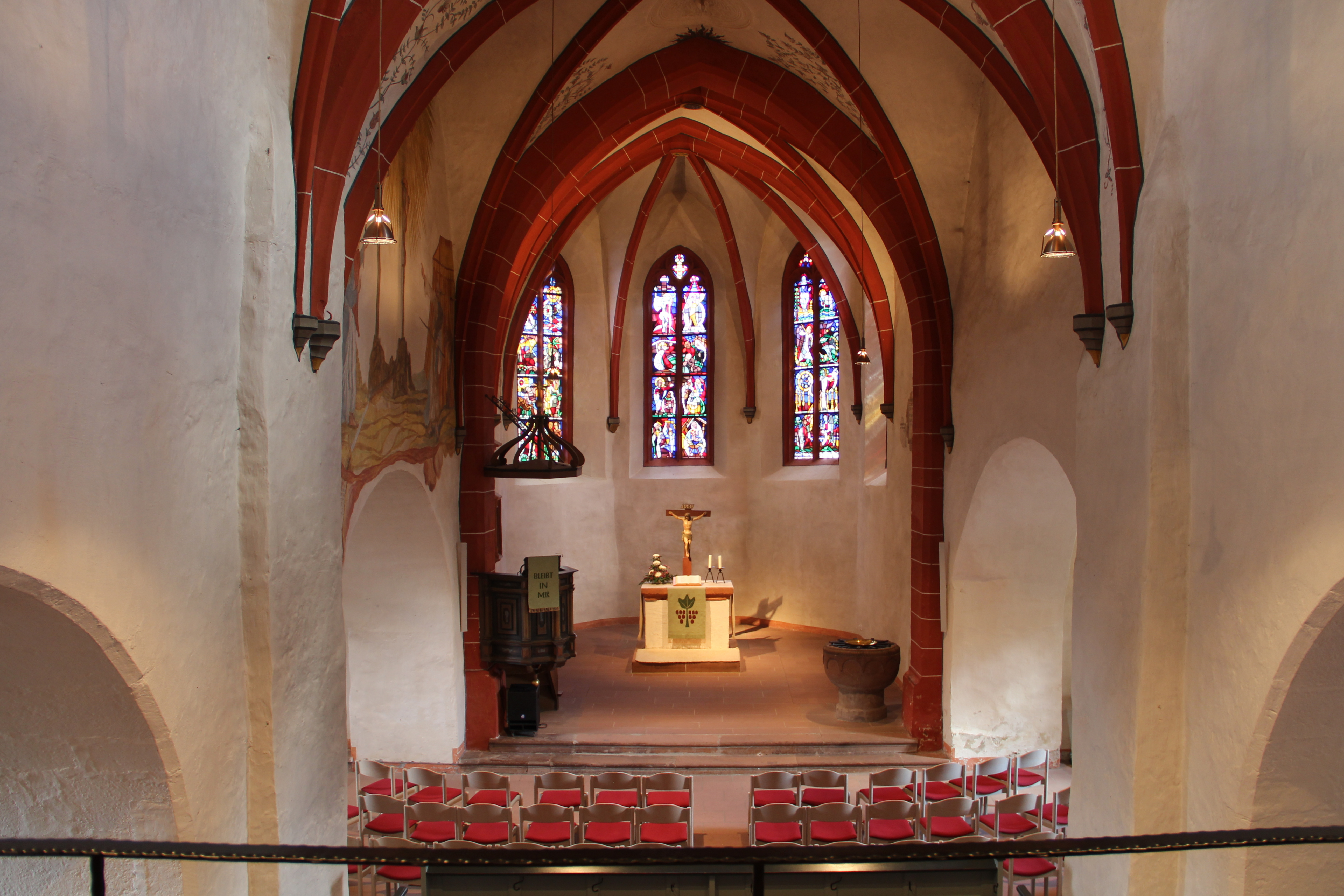 Innenaufnahme Martinskirche Gladenbach